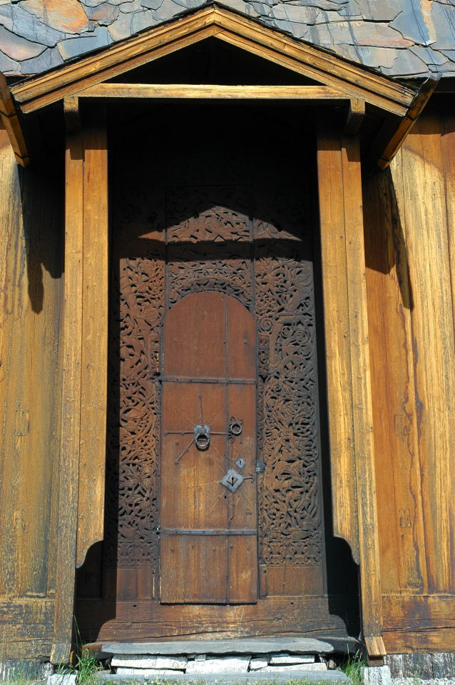 Stavkirke de Torpo